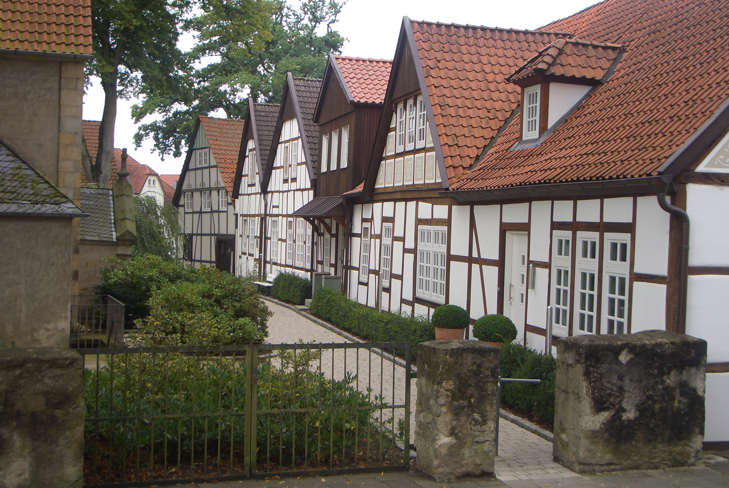 Fachwerkhaeuser an der Nordseite des Bockhorster Kirchplatzes